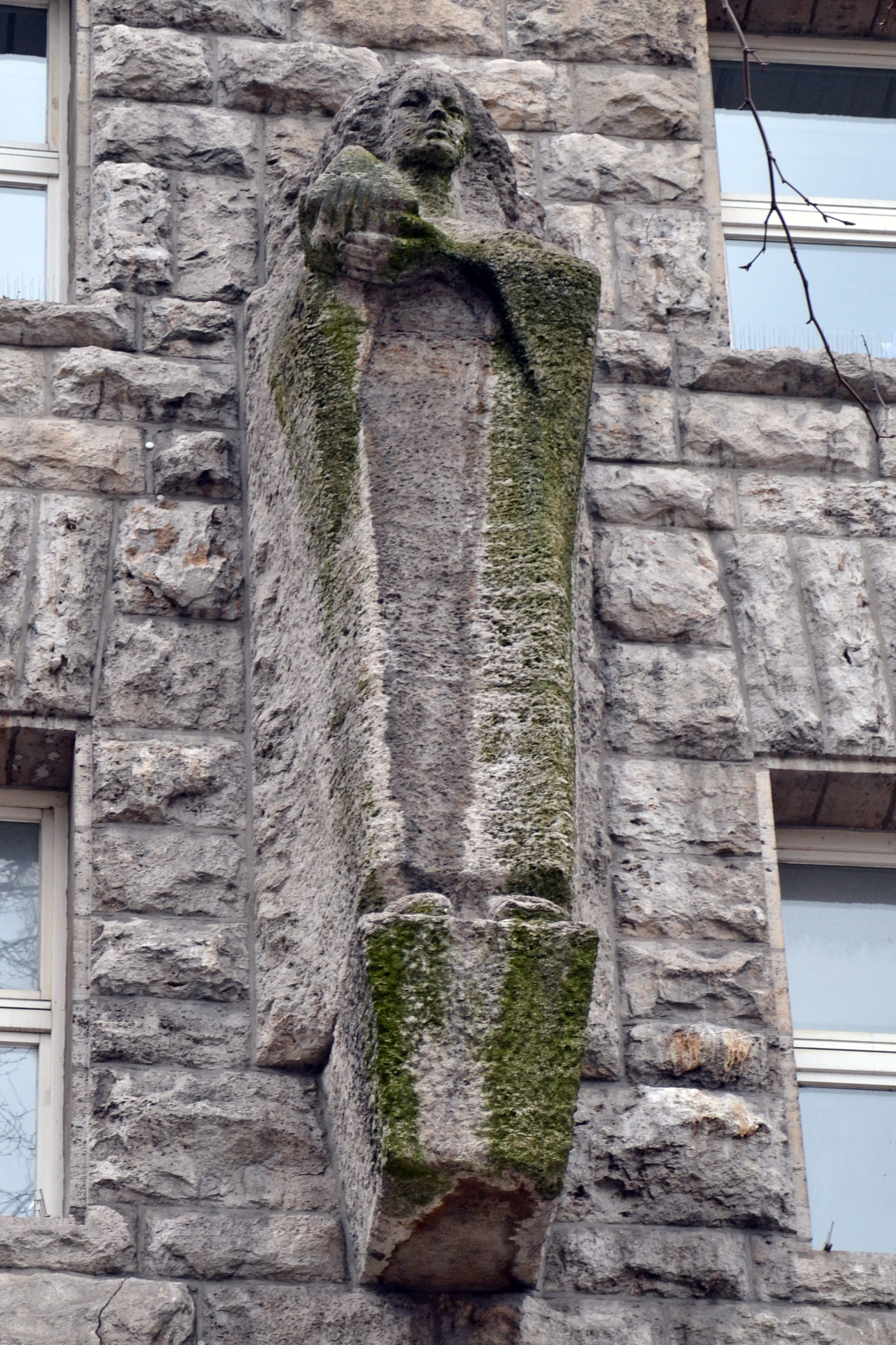 Figur von Joseph Enseling am Baedekerhaus im Essener Stadtkern